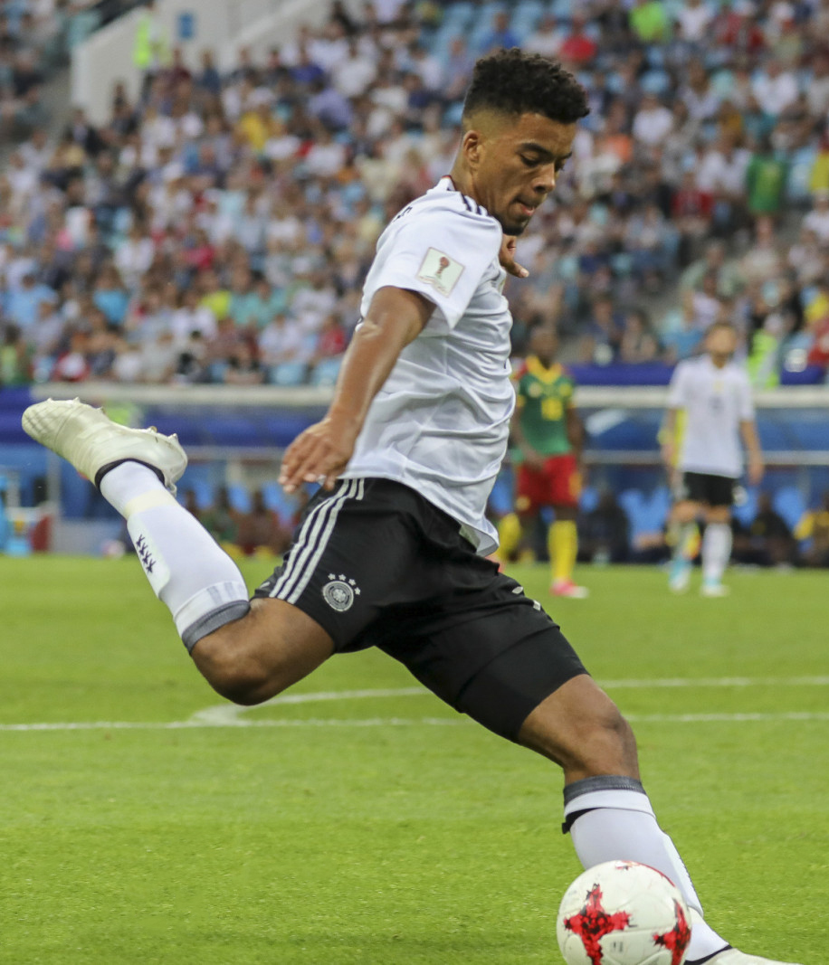 Германия - Камерун